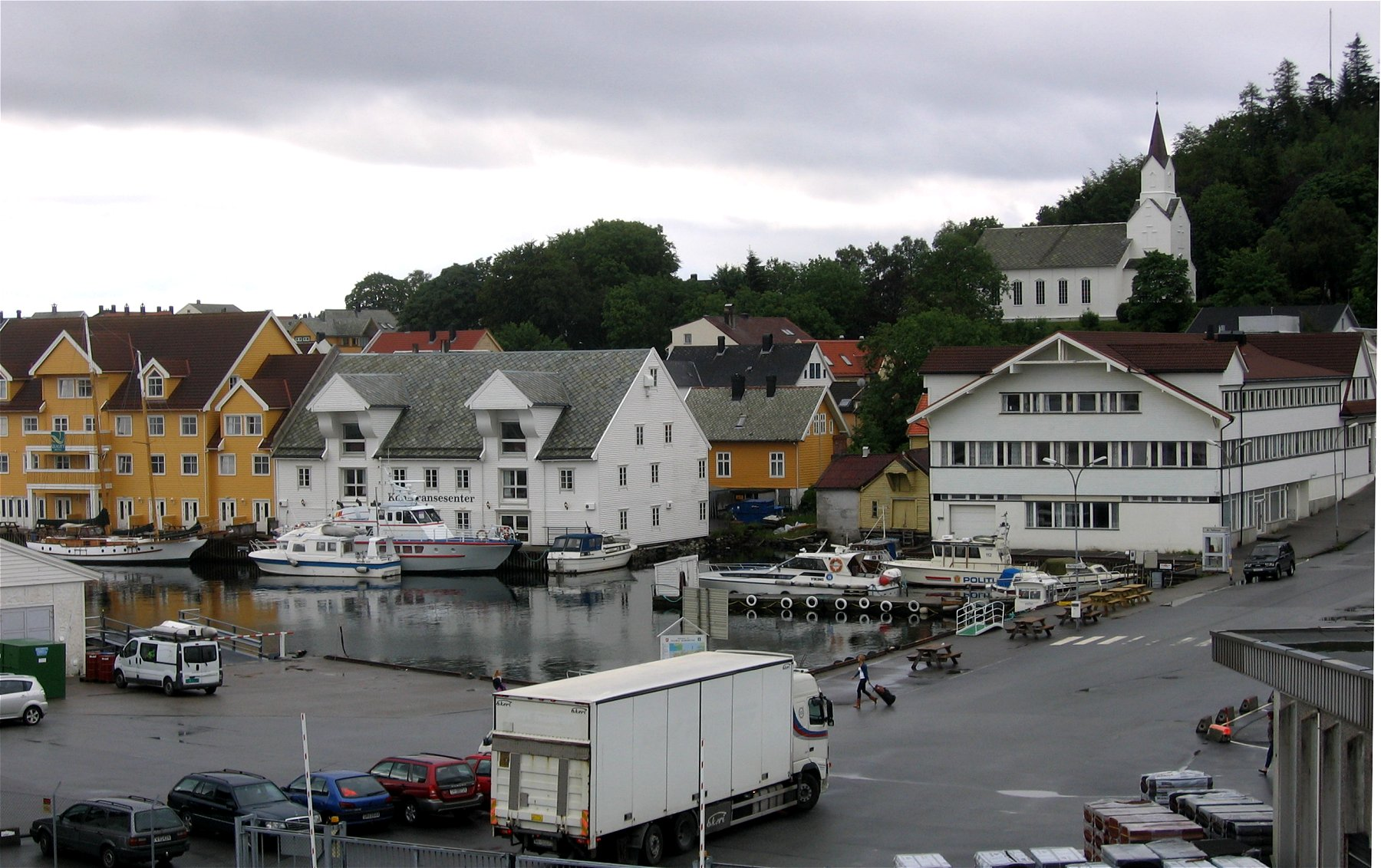 Florø, Norwegen